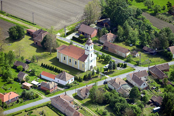 Gáborjánháza északi része, a falu főutcájával, a Kossuth Lajos úttal és a település egyetlen templomával. Nagyboldogasszony-templom [1]